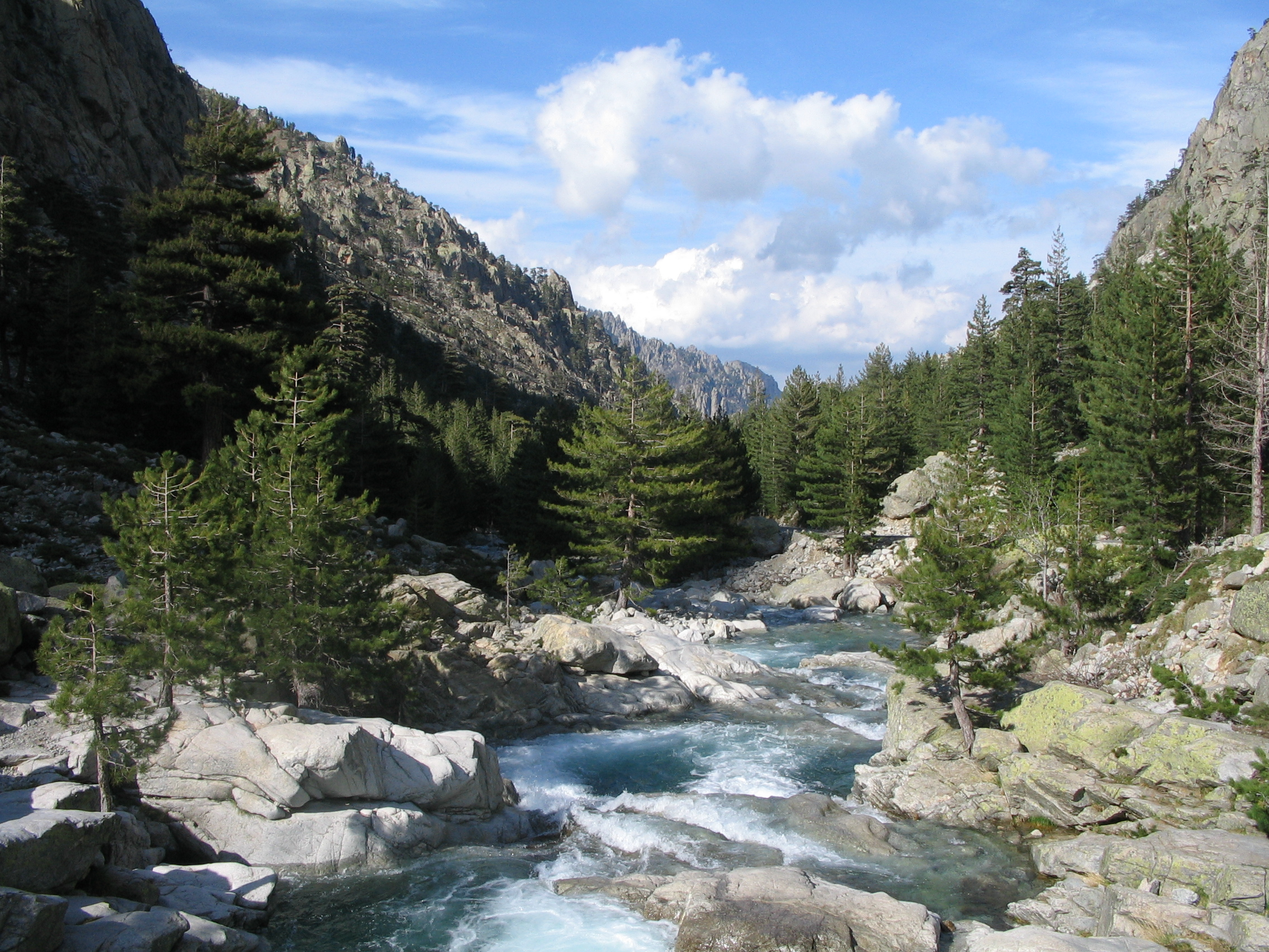 Gorges et rivière de la restonica, Haute-Corse. Photo de l'auteur.